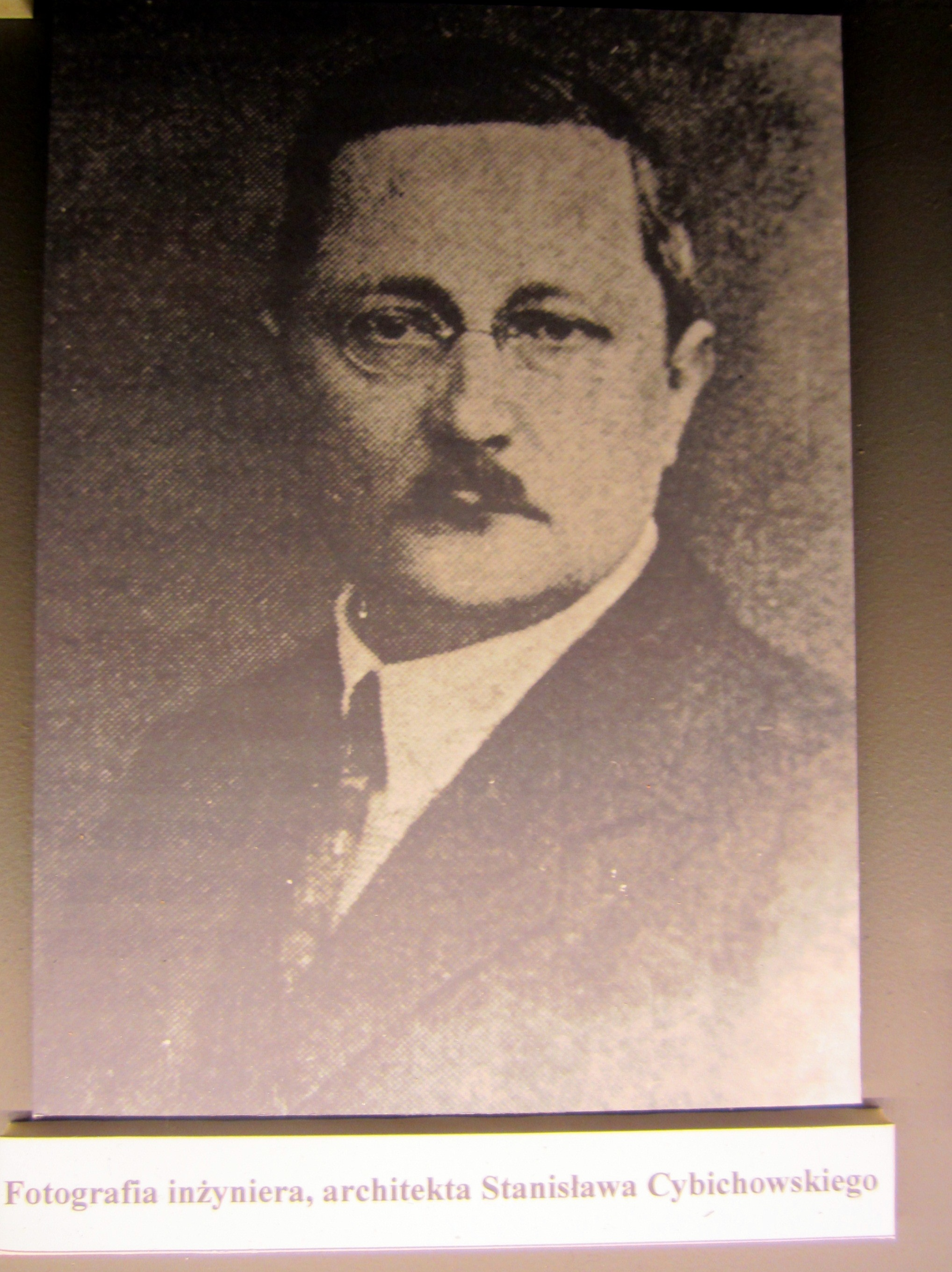 Stefan Cybichowski - fragment wystawy na Forcie VII w Poznaniu